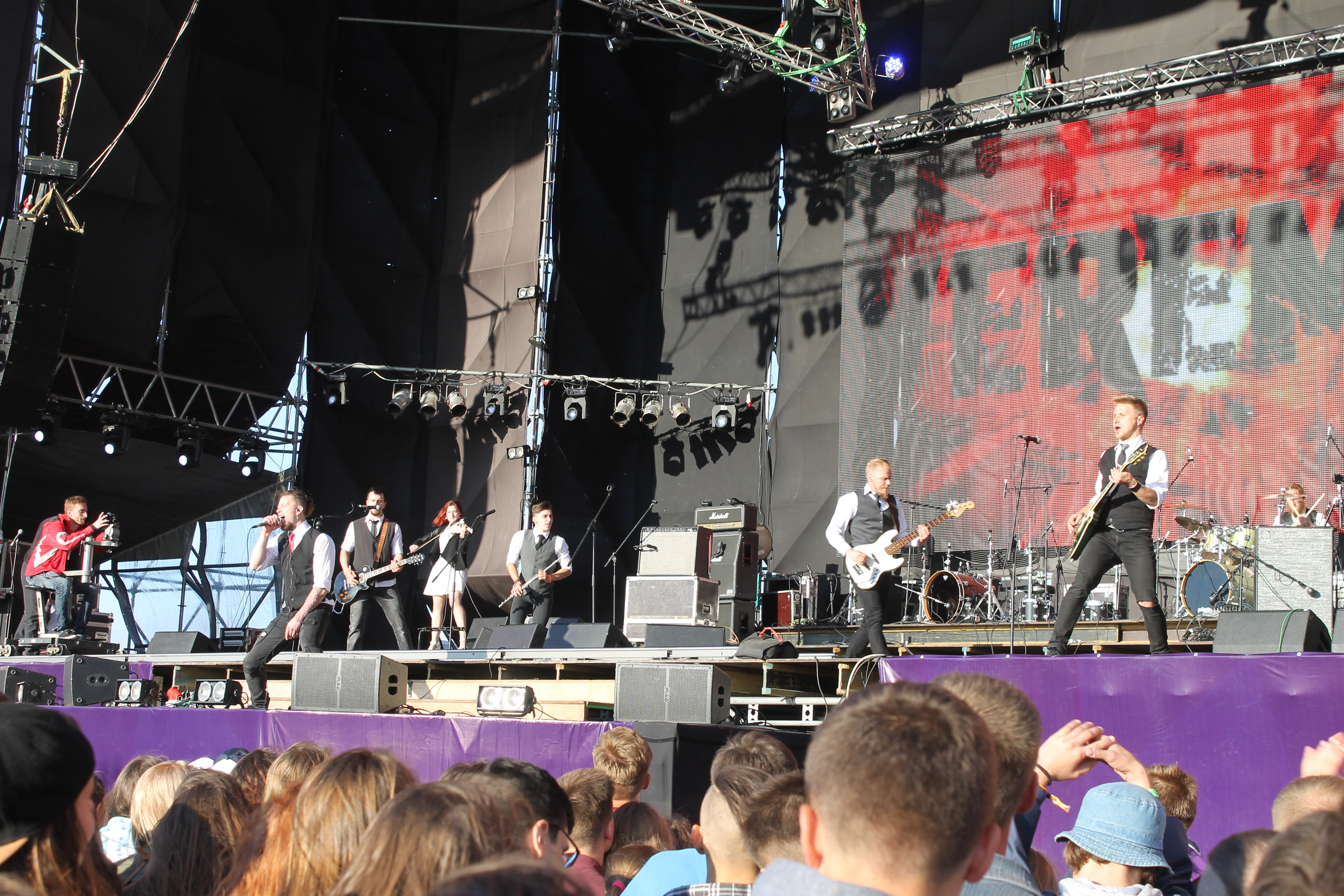 Веремій на фестивалі. Головна сцена